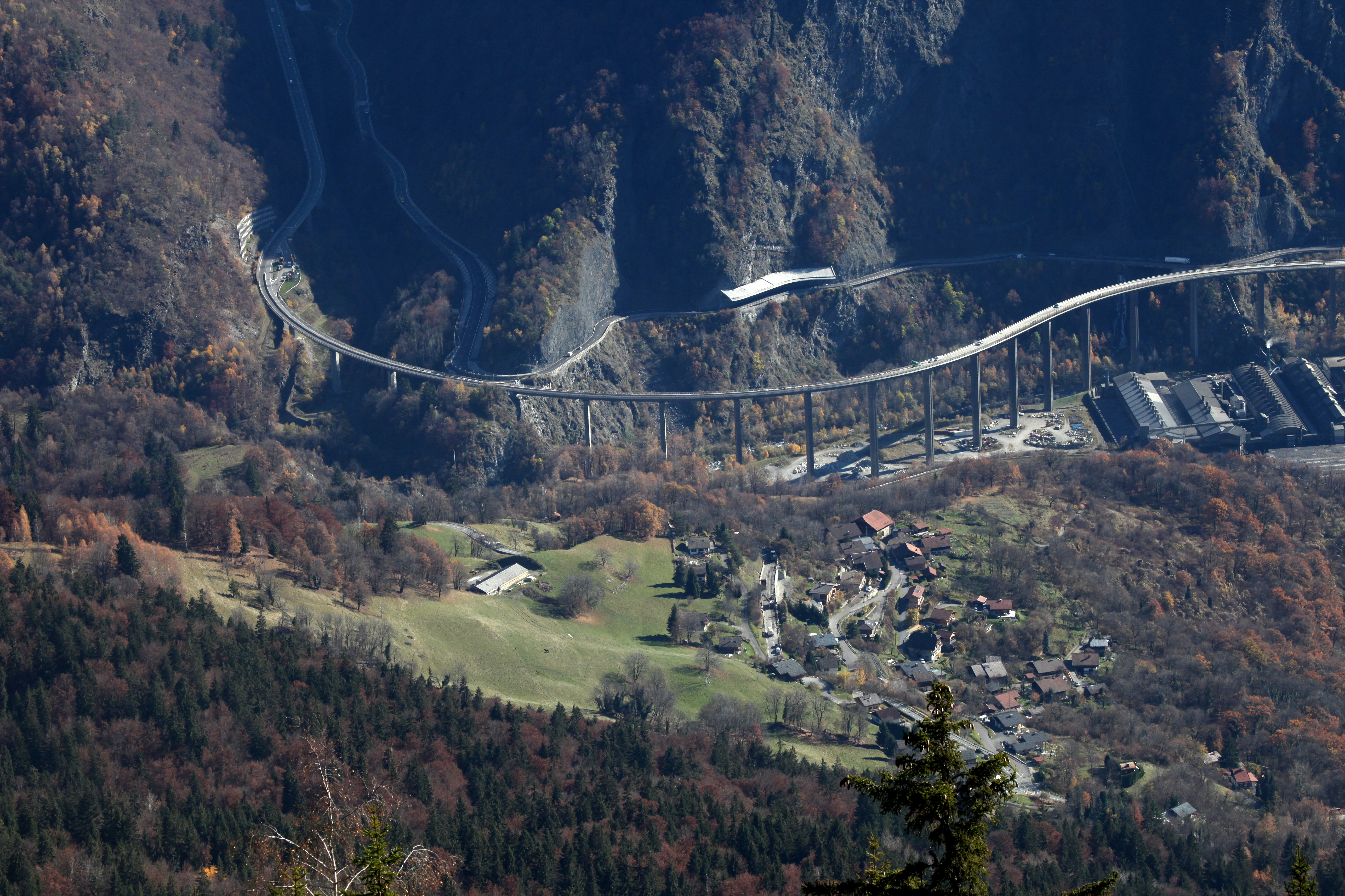 Le viaduc des Egratz vu de Platé.